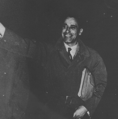 Abderrahim Bouabid en 1955